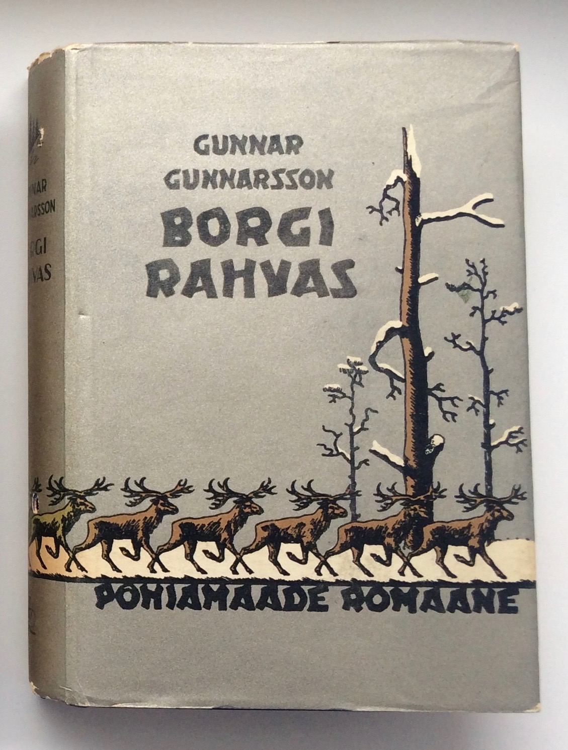 Ümbrispaberiga esikaane kujundus